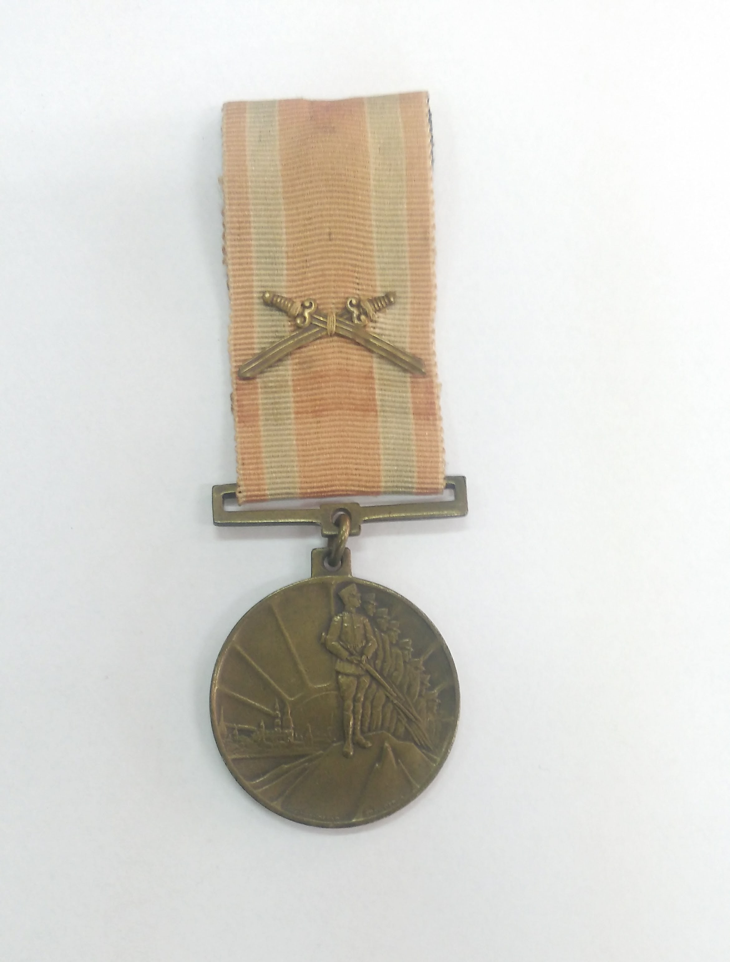 Awers łotewskiego Medalu 10 Rocznicy Wojny Niepodległościowej